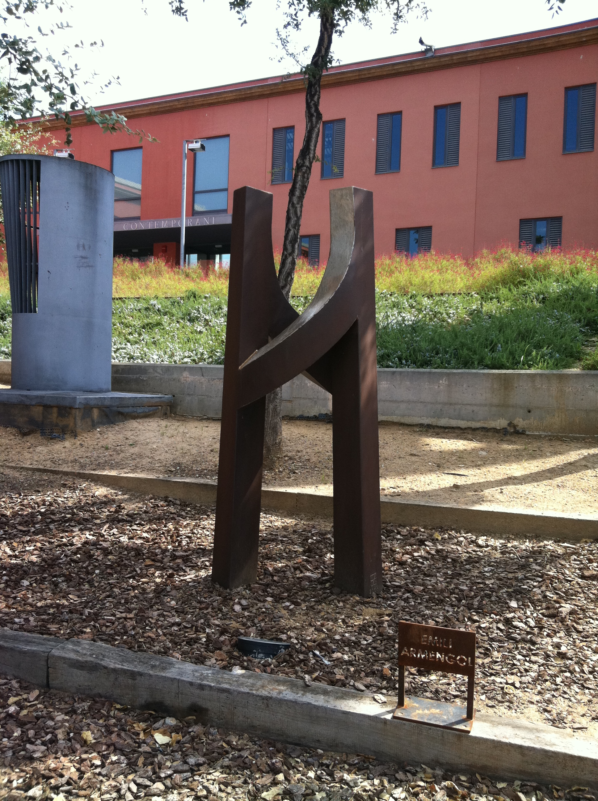 Jardí d'escultures de la Plaça Can Mario, a Palafrugell, al Baix Empordà, a l'exterior de la Fundació Vila Casas